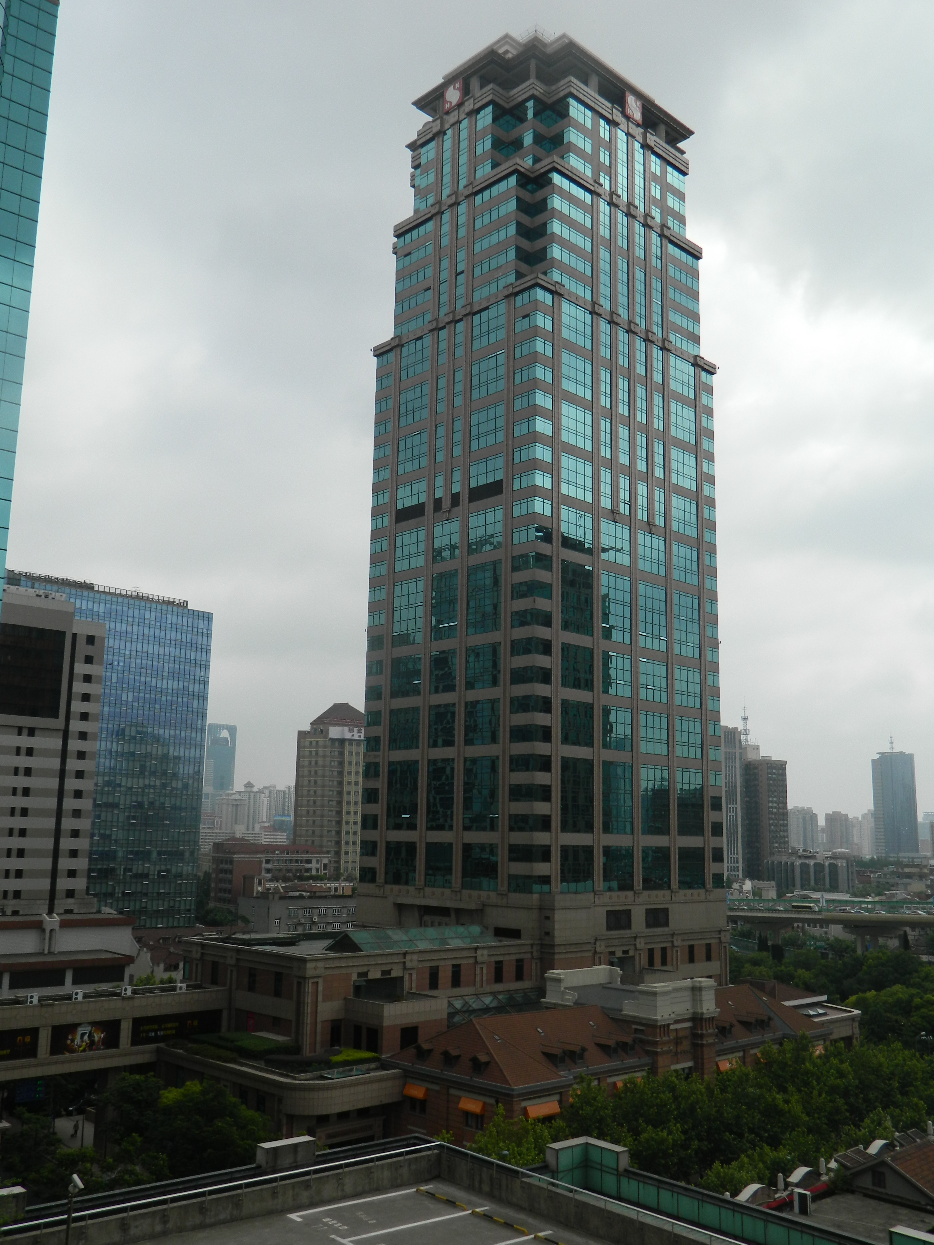 9楼平台-中环广场 Central Plaza